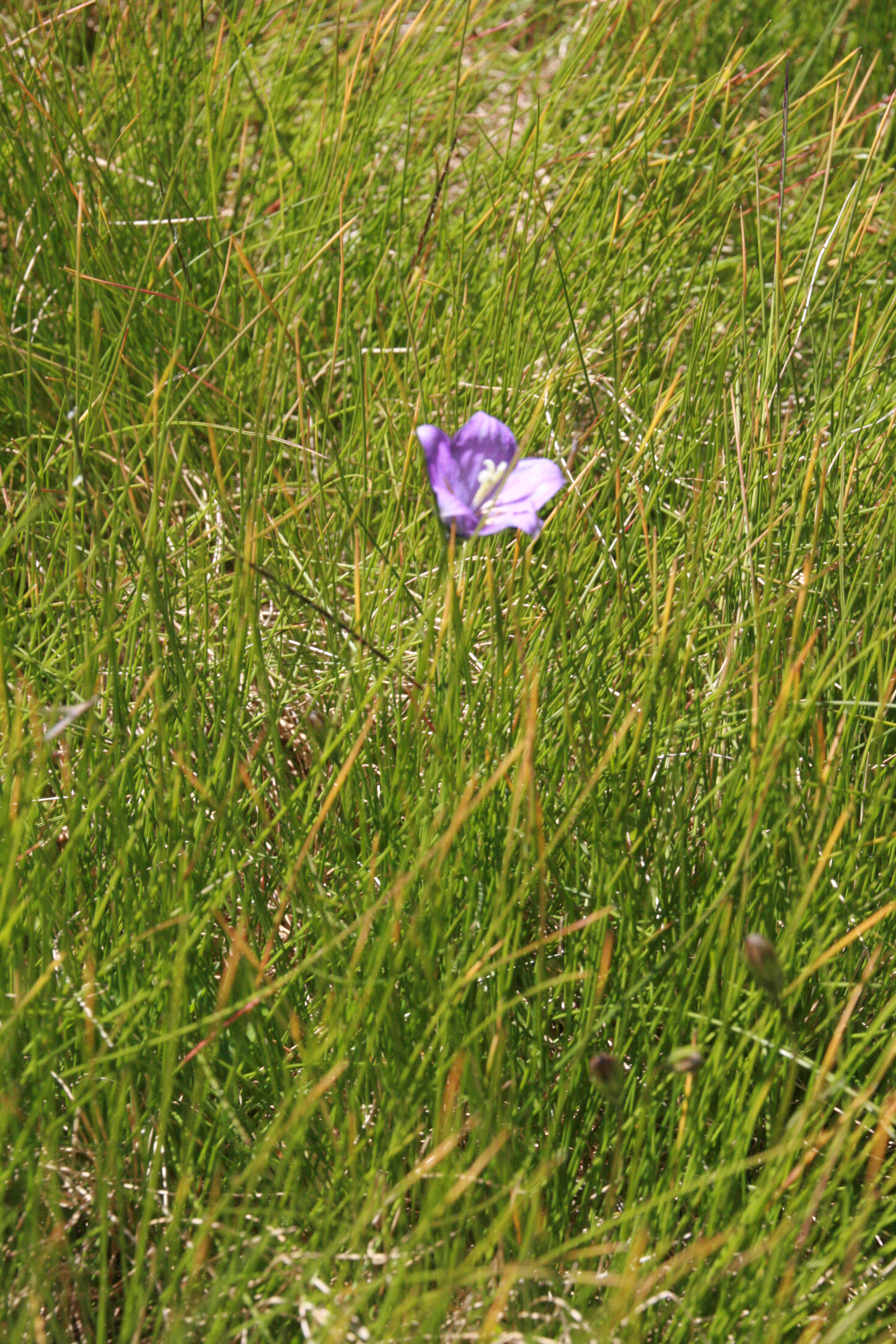 Campanula herminii en las inmediaciones de la Laguna Grande del Circo de Gredos en la Sierra de Gredos. España This is a photography of a Special Area of Conservation in Spain with the ID: ES4110002. Natura2000 entry, EEA entry